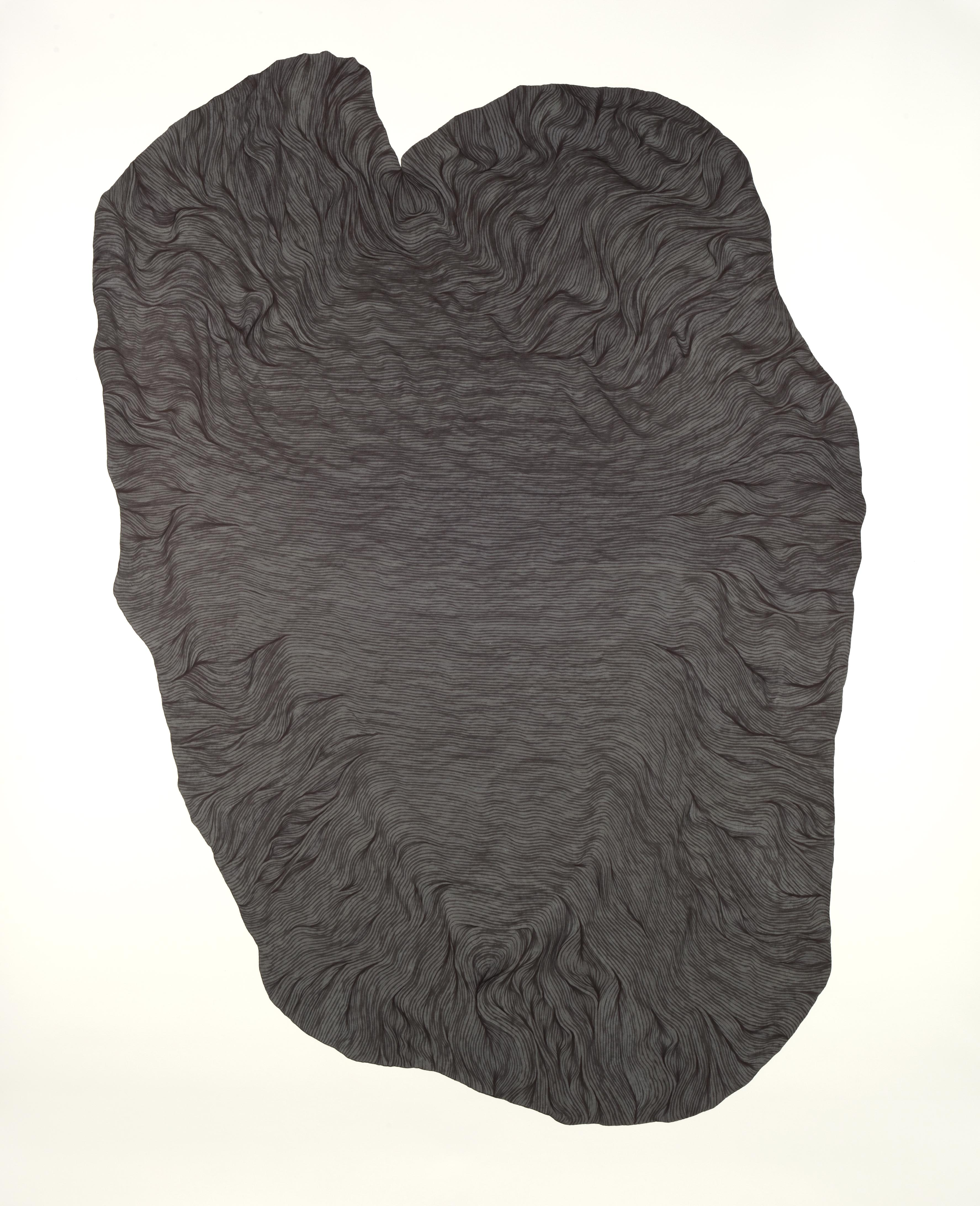 Filzstift auf Papier 200x150cm